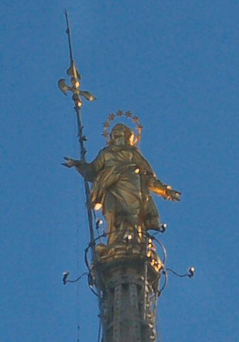 "La Madonnina", statua barocca in bronzo dorato, collocata sulla guglia più alta del Duomo di Milano.